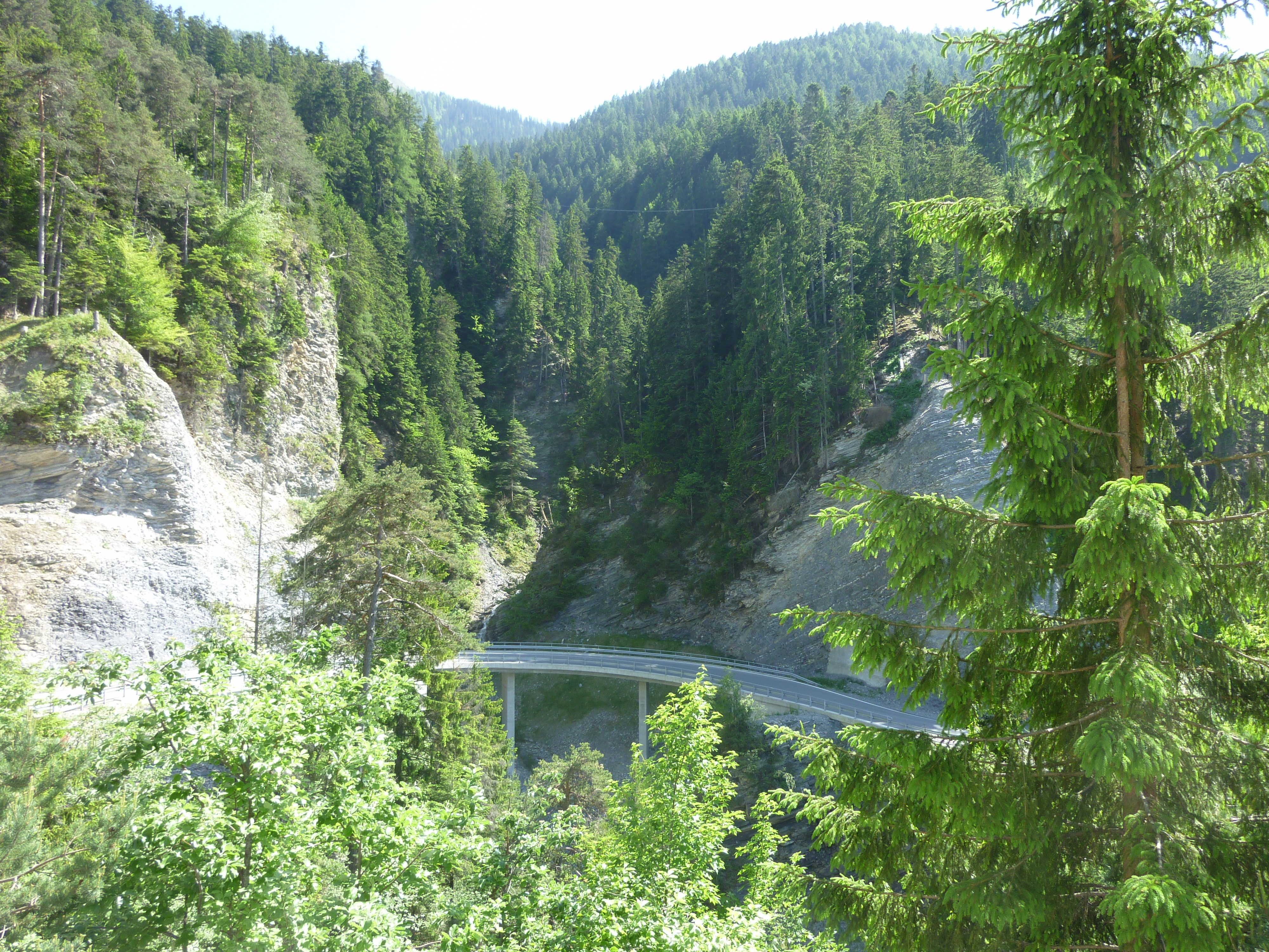 Strasse nach Tschiertschen im Steinbachtobel